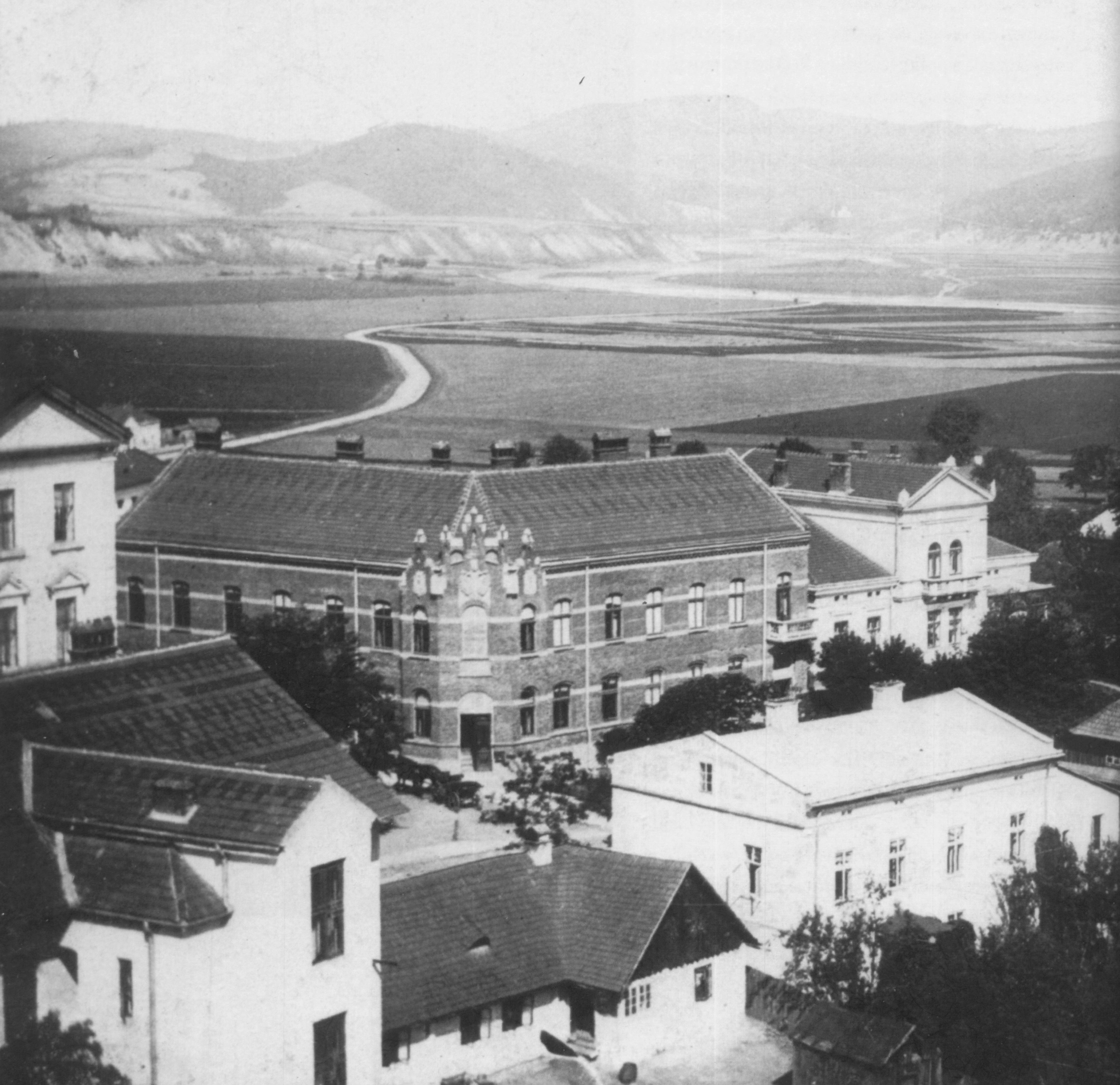 Ulica Jana III Sobieskiego w Sanoku. W tle widok na obecną dzielnicę Wójtostwo i wieś Trepczę.